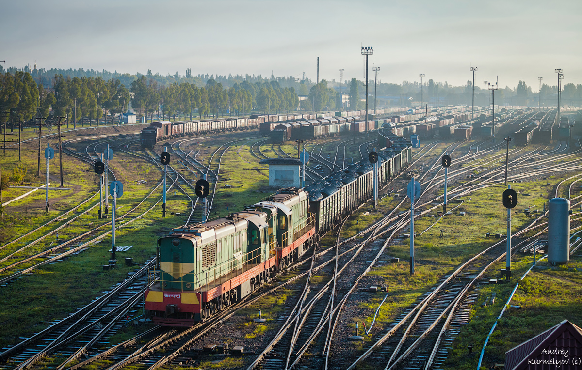 ЧМЭ3Э-6722